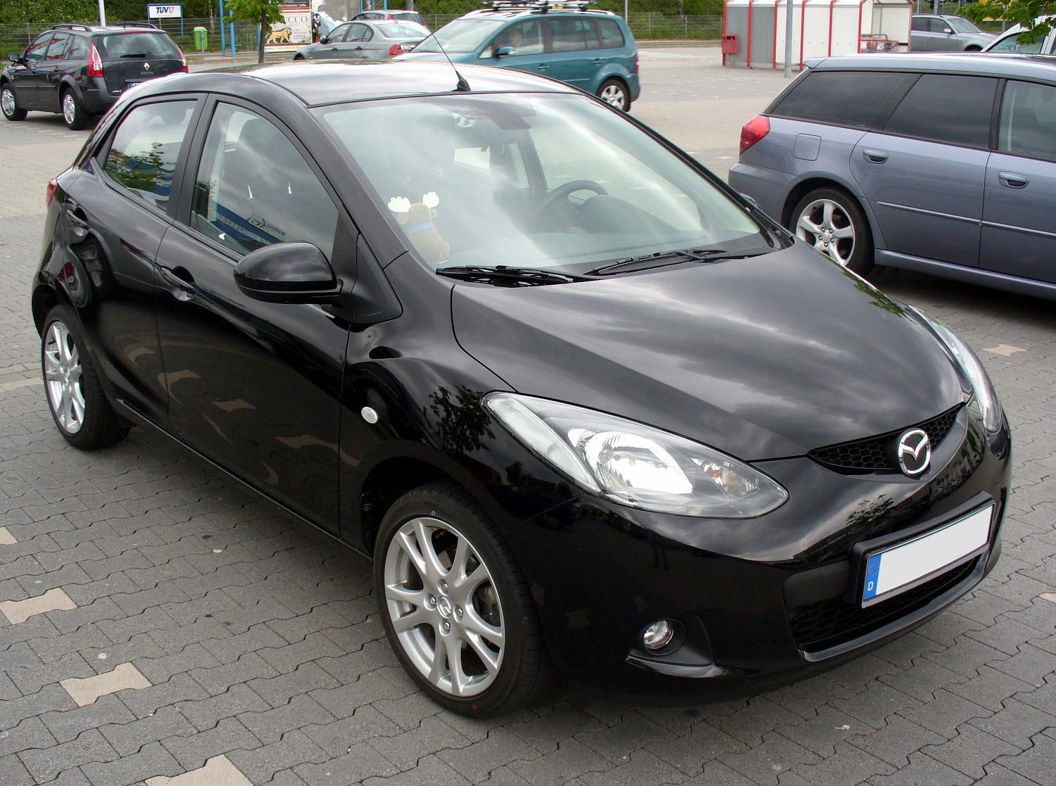 Mazda 2